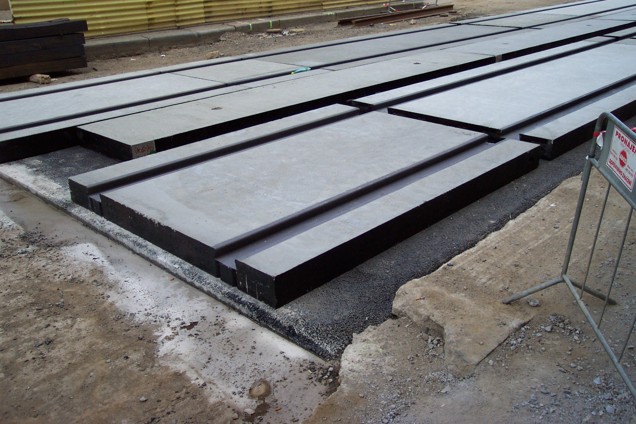 Rekonstrukce TT na Výtoni, montování kolejí na pražce do vozovky a BKV panelů v místech mimo křižovatku - Reconstruction of tram track at Prague Výtoň, montage of track on sleepers (crossing) and on BKV concrete panels (rest of the track)